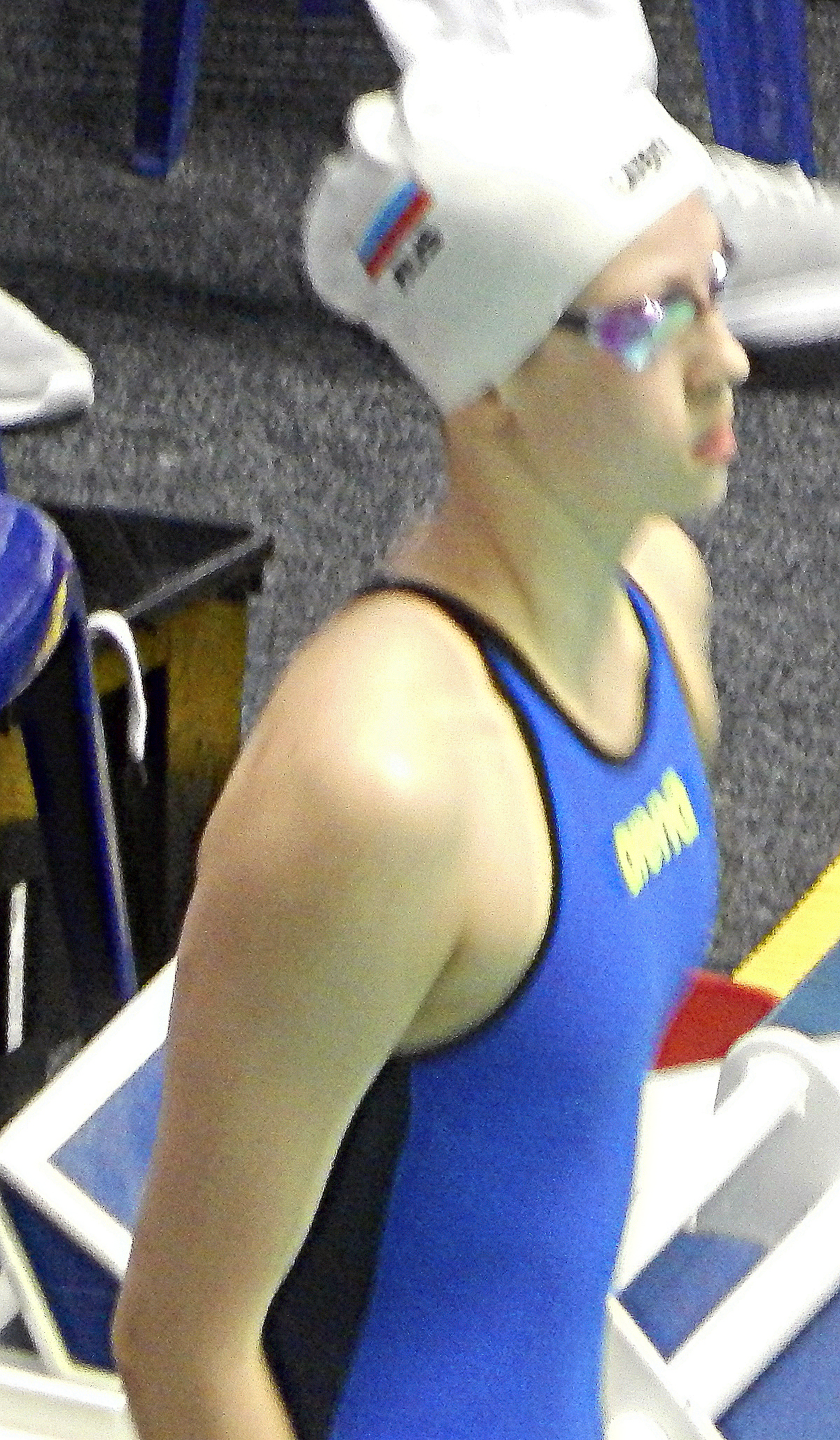 Чемпионат России по плаванию 2018, первый полуфинал на дистанции 50 метров на спине. Дорожка 4 - Мария Каменева (Санкт-Петербург - Оренбургская область)